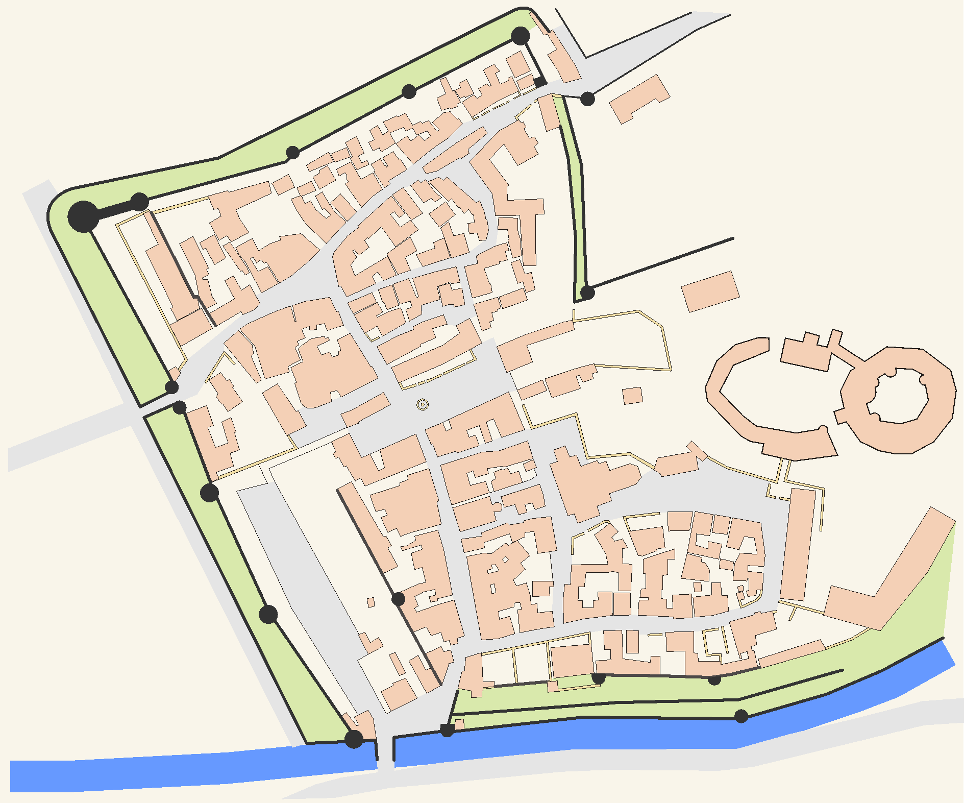 Stadtplan der Büdinger Altstadt; selbst gezeichnet von Steschke, 12. + 13. Januar 2005